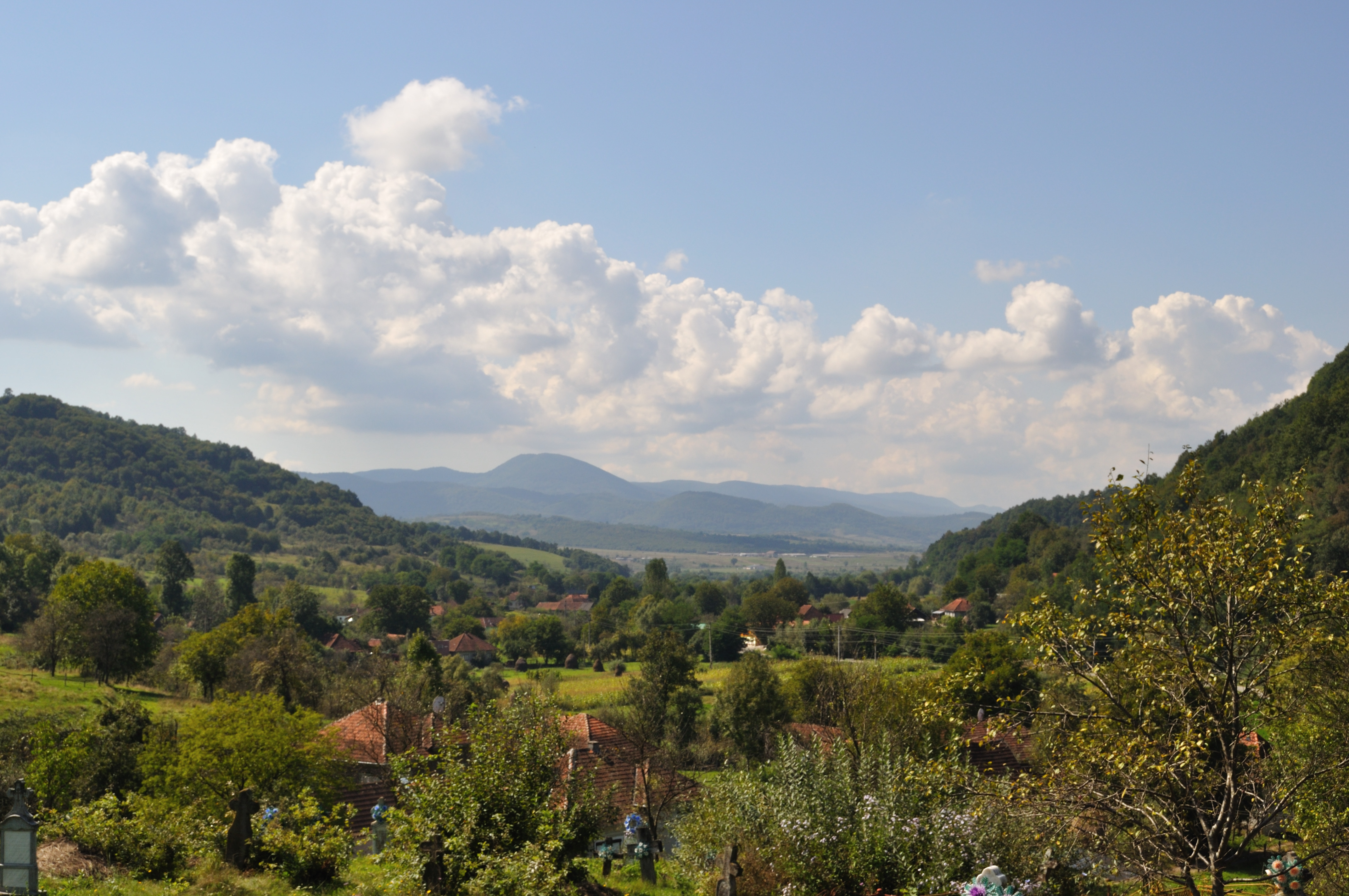 Crișan, Hunedoara